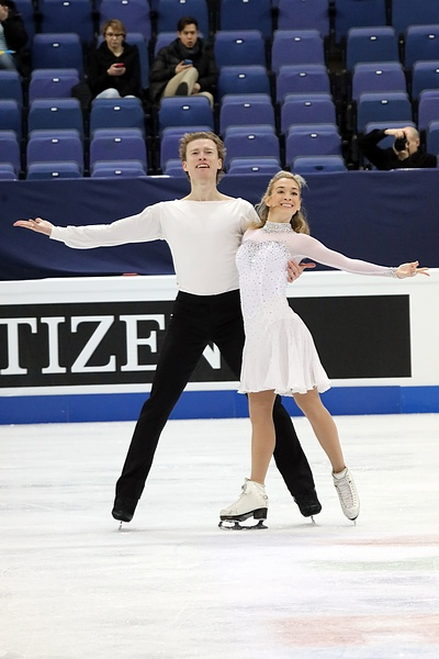 Изабелла Тобиас / Илья Ткаченко (Израиль) на чемпионате мира 2017